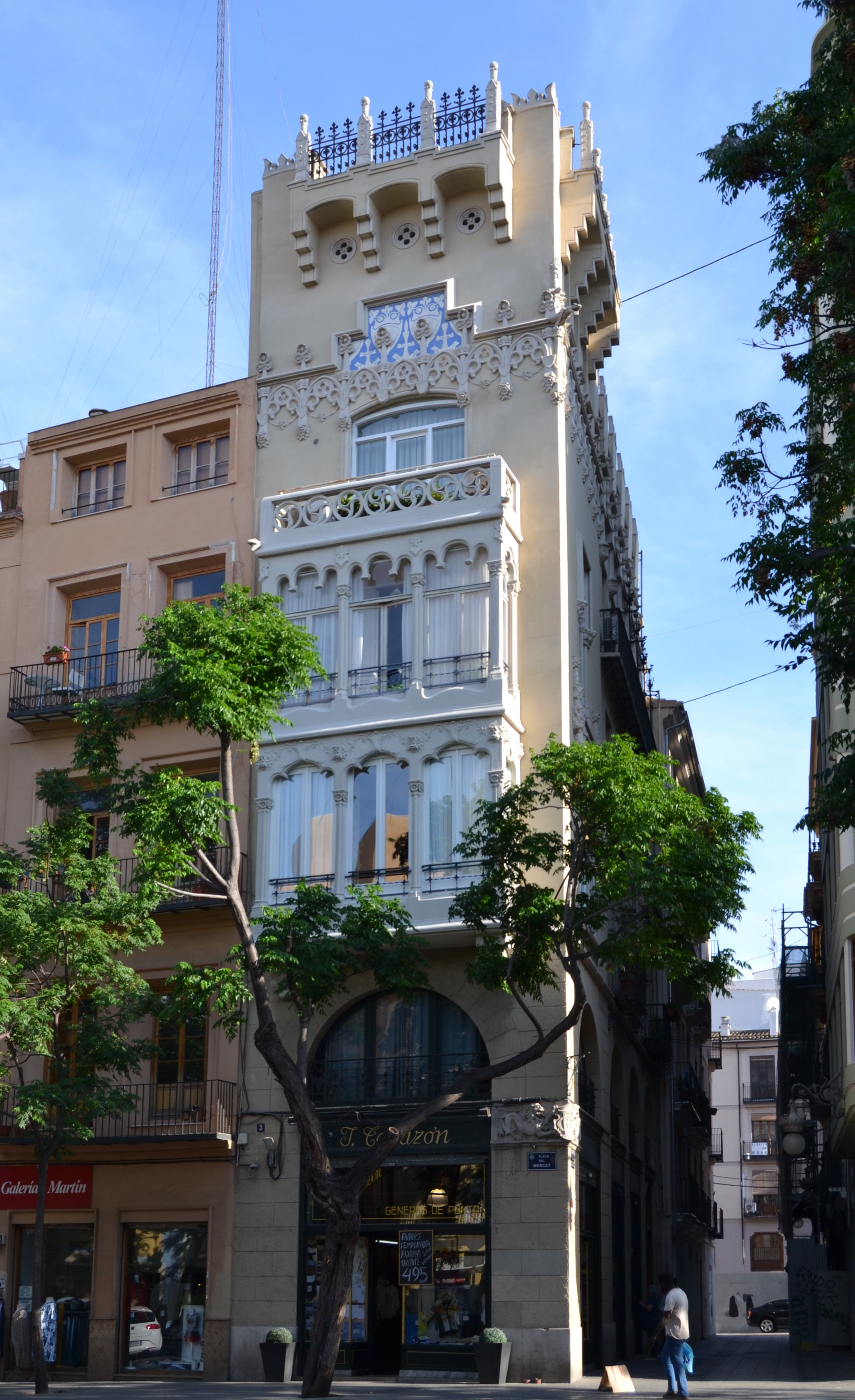 Casa Ordeig de València.